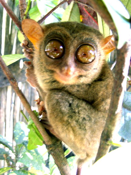 Carlito syrichta Tagalog: Tarsier sa Bohol,Pilipinas